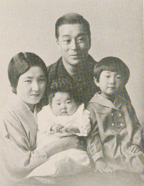 早川種三、妻梅子、長女雅子、次女竹子